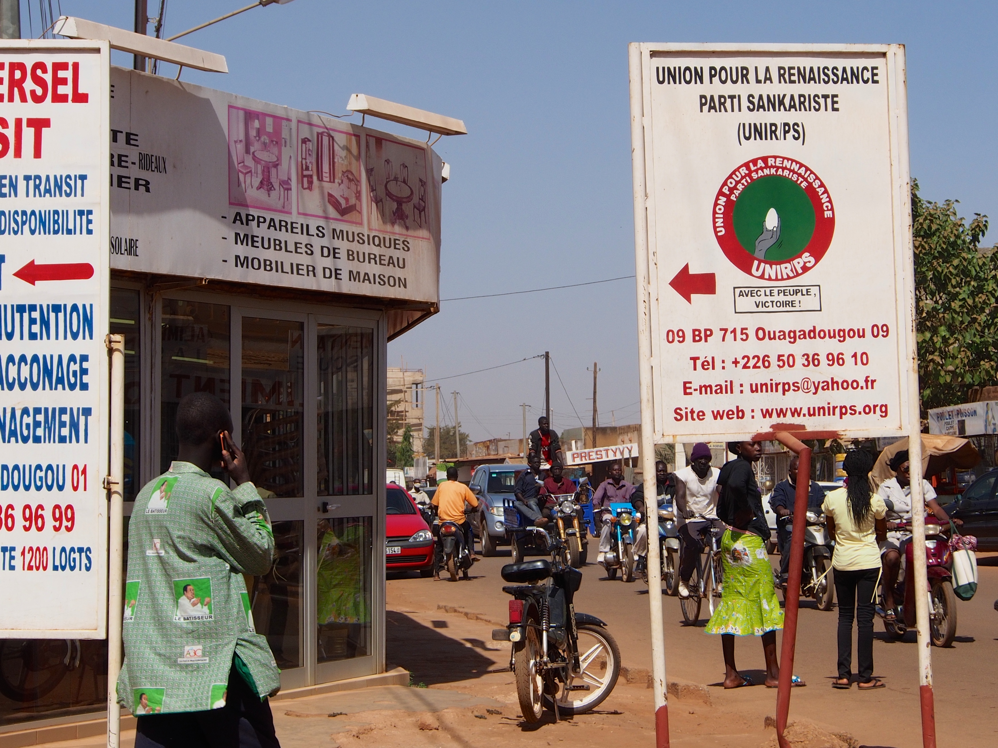 Une pancarte indiquant le siège de l'UNIR/PS à Ouagadougou, Burkina Faso